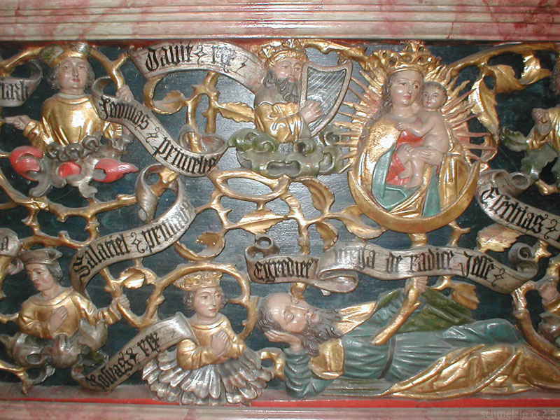 Detail der Predella des Anna-selbdritt-Altars mit Wurzel Jesse in der Frühmesskapelle der Stadtpfarrkirche St. Nikolaus in Gundelsheim (Württemberg).